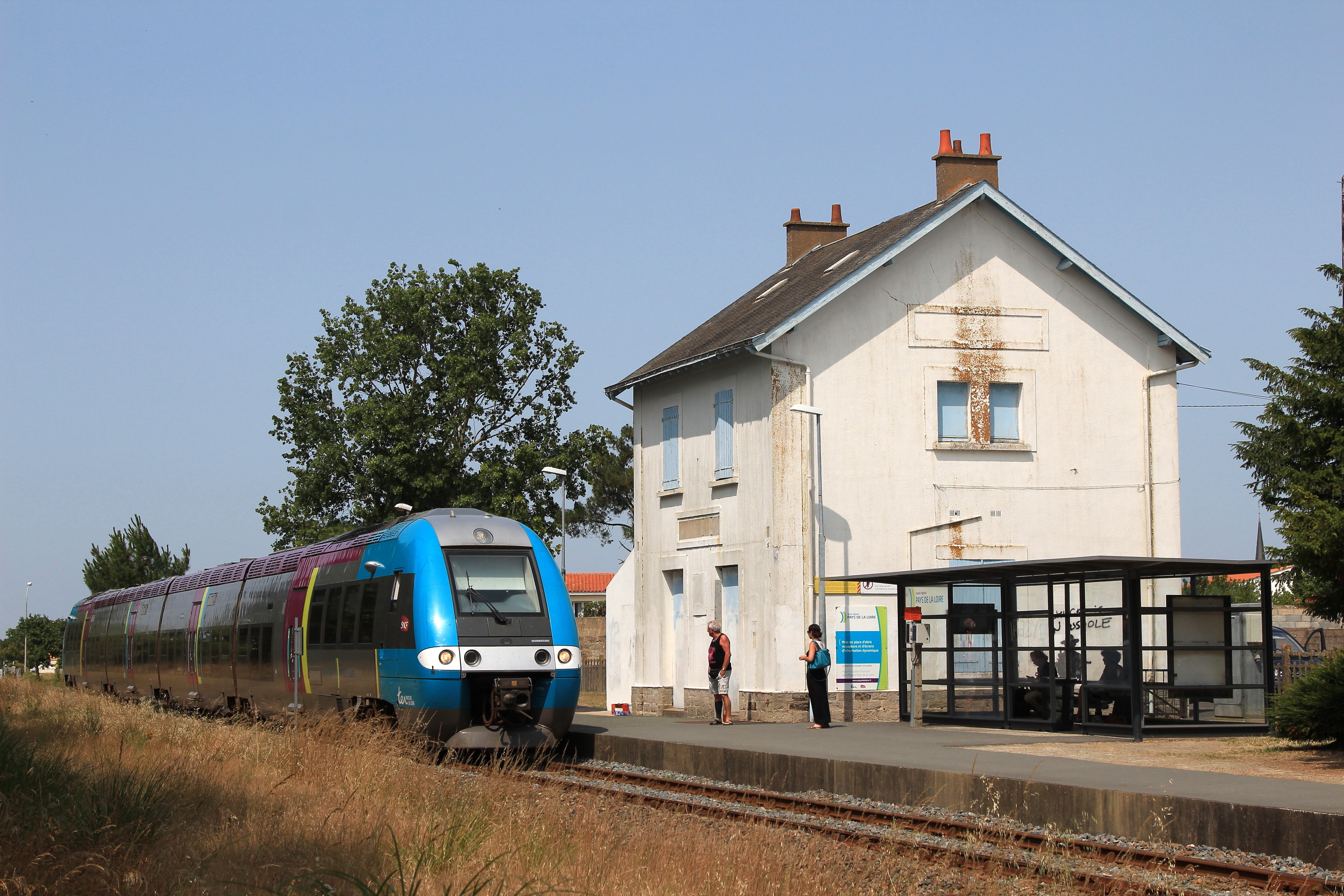 Un TER de la série X 76500 à destination de Saint-Gilles-Croix-de-Vie arrive en gare de Saint-Hilaire-de-Riez.